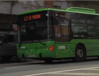 Un autobús de la ciutat de Manresa.